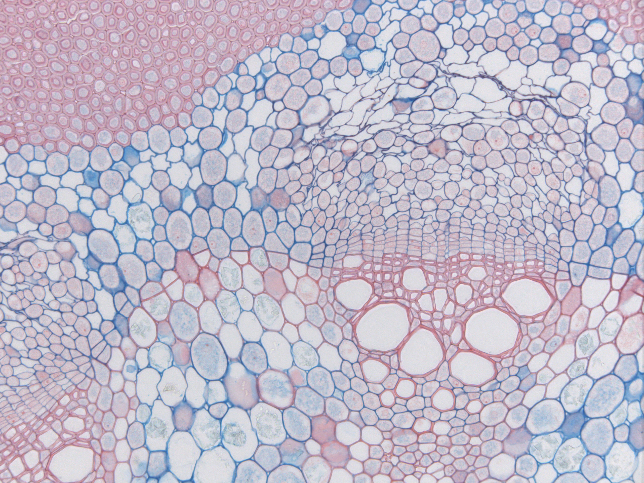 Querschnitt durch einen einjährigen Spross von Aristolochia macrophylla (Pfeifenwinde). Zu sehen ist der primäre Entwicklungszustand des Sprosses mit ersten sekundären Veränderungen im Bereich der primären Markstrahlen. In der Bildmitte links ist ein primärer Markstrahl mit beginnender Bildung von interfaszikulärem Kambium zu sehen wobei es bei den Parenchymzellen des Markstrahls zu einer Remeristematisierung kommt. Dauerpräparat Kunststoffschnitt (Glycolmethacrylat), Färbung mit Safranin und Astralblau. Zur Bezeichnung einzelner Gewebe den Mauszeiger über das Bild bewegen (Notizfunktion).